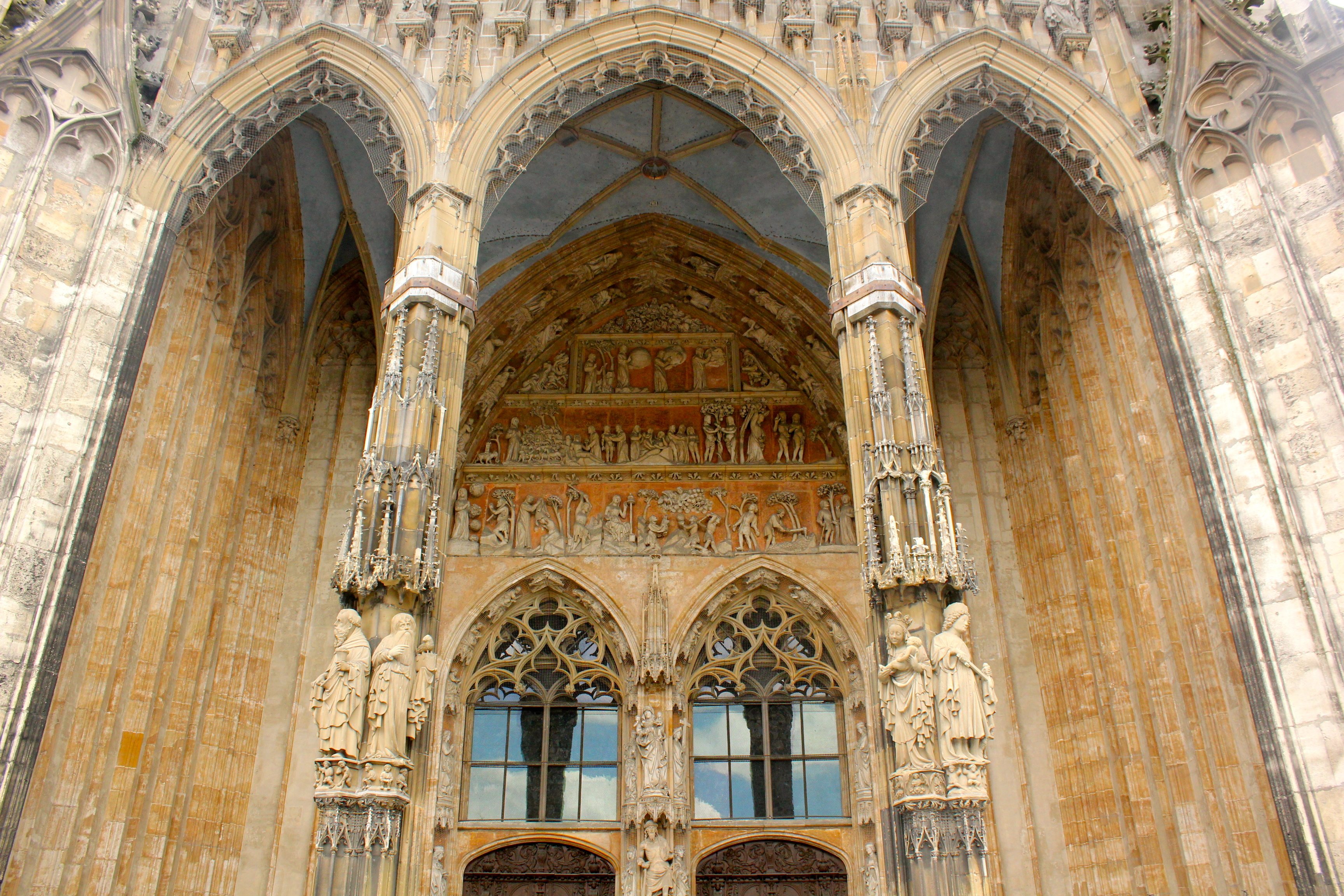 Portal de la Catedral d'Ulm